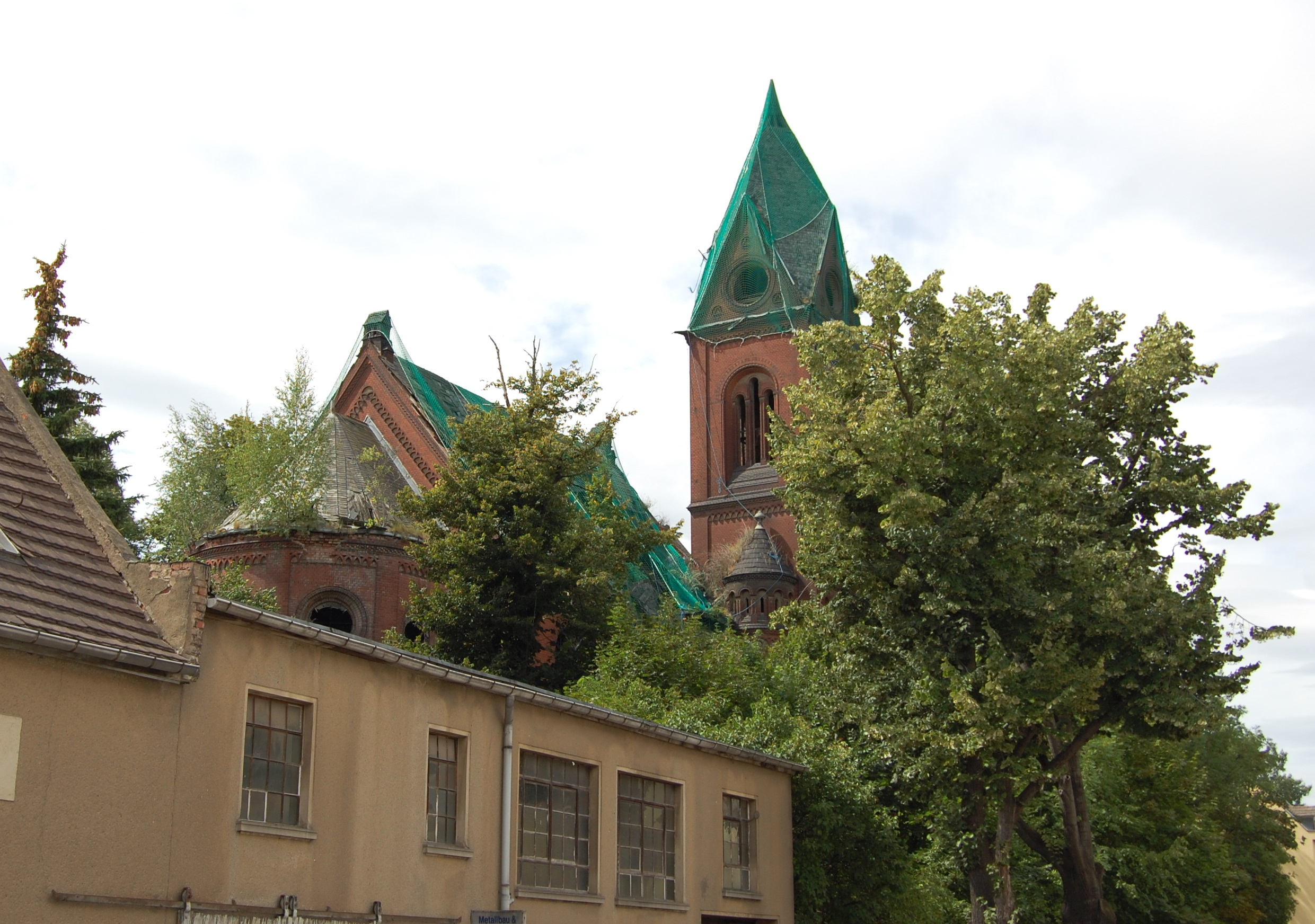 ruinöse Kirche im Bernburger Ortsteil Waldau, Magdeburger Straße